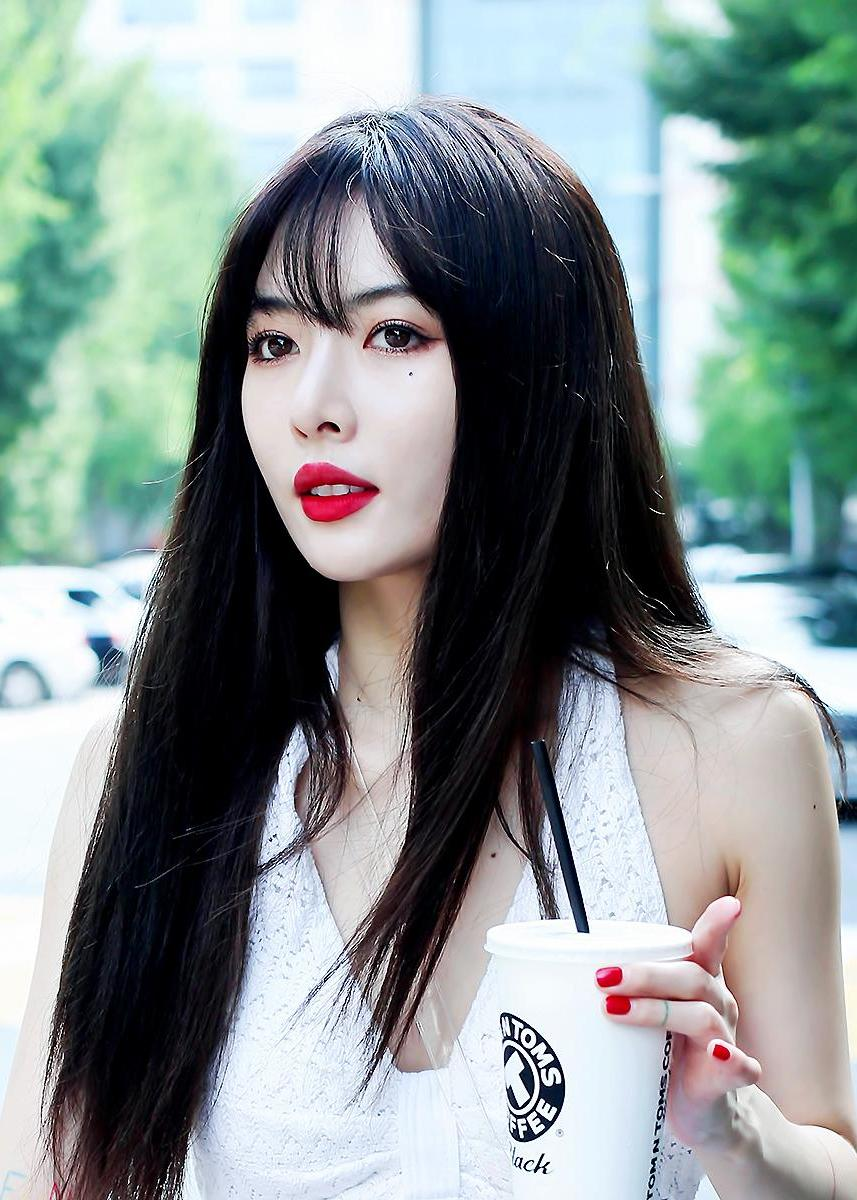 180727 뮤직뱅크 재출근